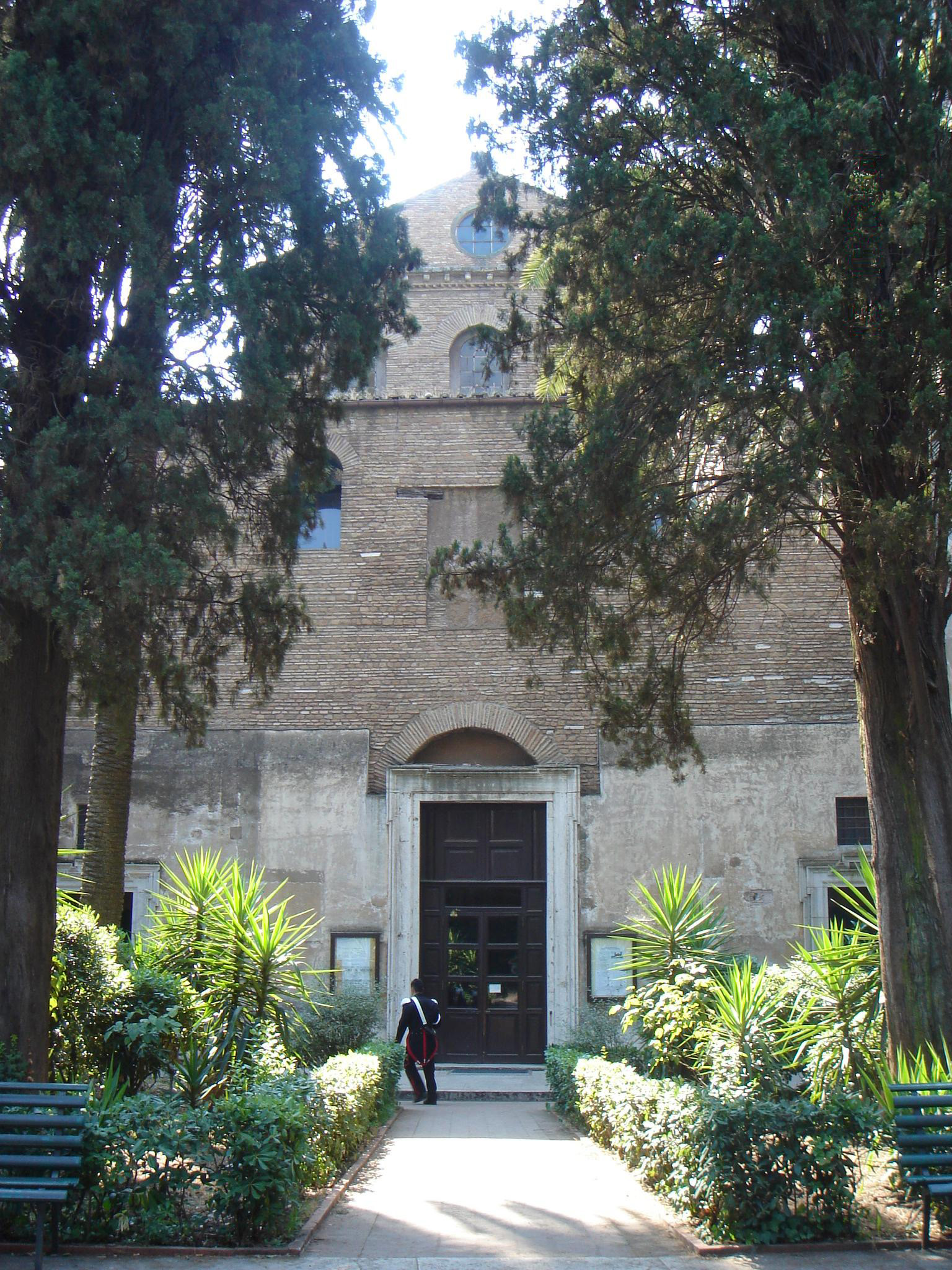 Roma , sant'Agnese fuori le mura: ingresso inferiore. Licensing